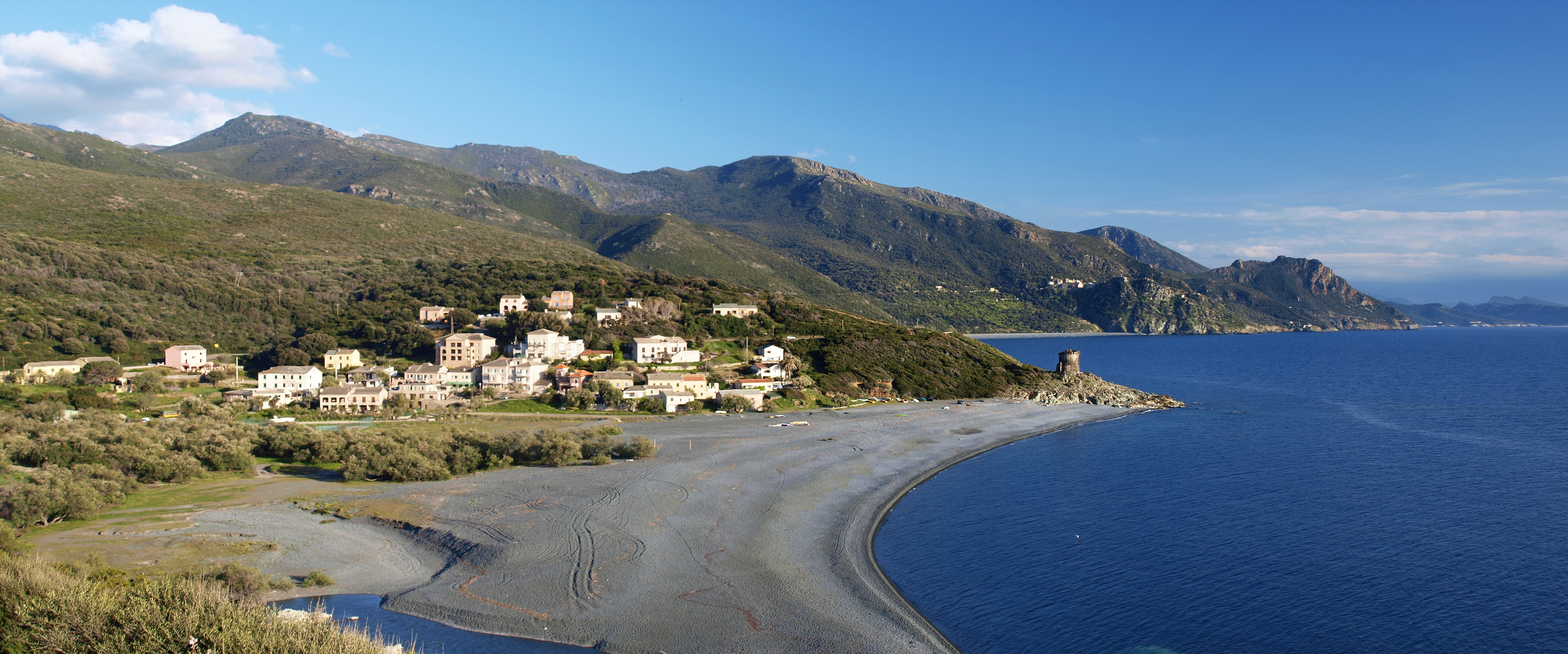 Ogliastro (Corsica) - U Guadu grande à son embouchure à Marine d'Albo. En arrière-plan Nonza